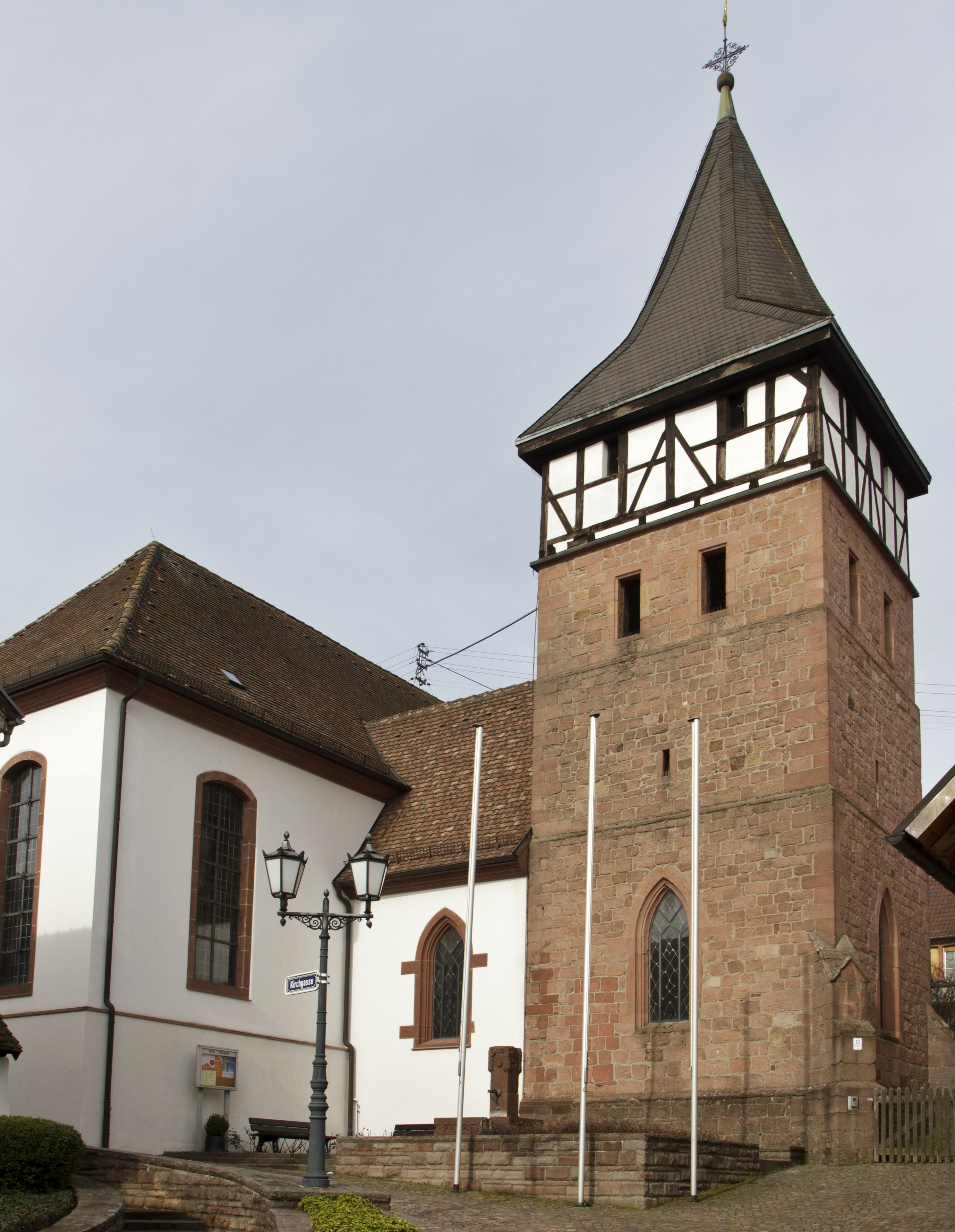 Ranschbach, Katholische Pfarr- und Wallfahrtskirche Allerheiligen; Saalbau unter Walmdach, 1782; spätgotischer ehemaliger Chorturm, teilweise Fachwerk, 15. Jahrhundert